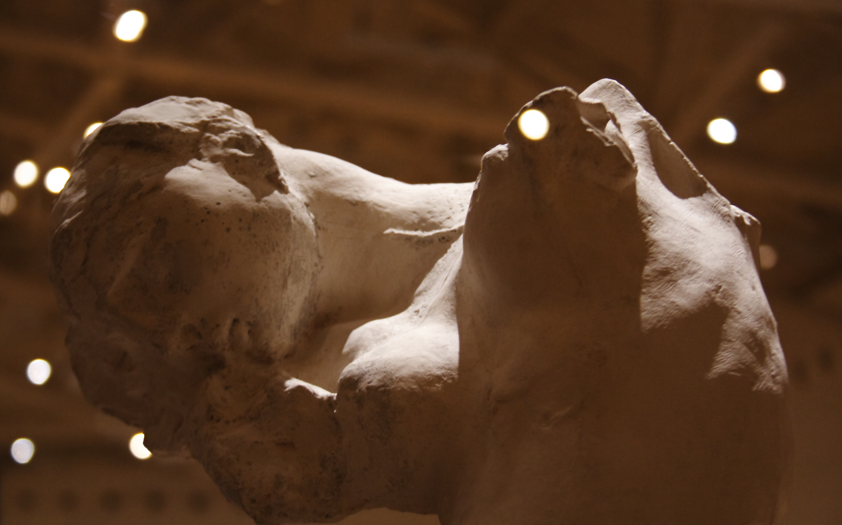 Escultura de Auguste Rodin en mármol blanco creada en 1886